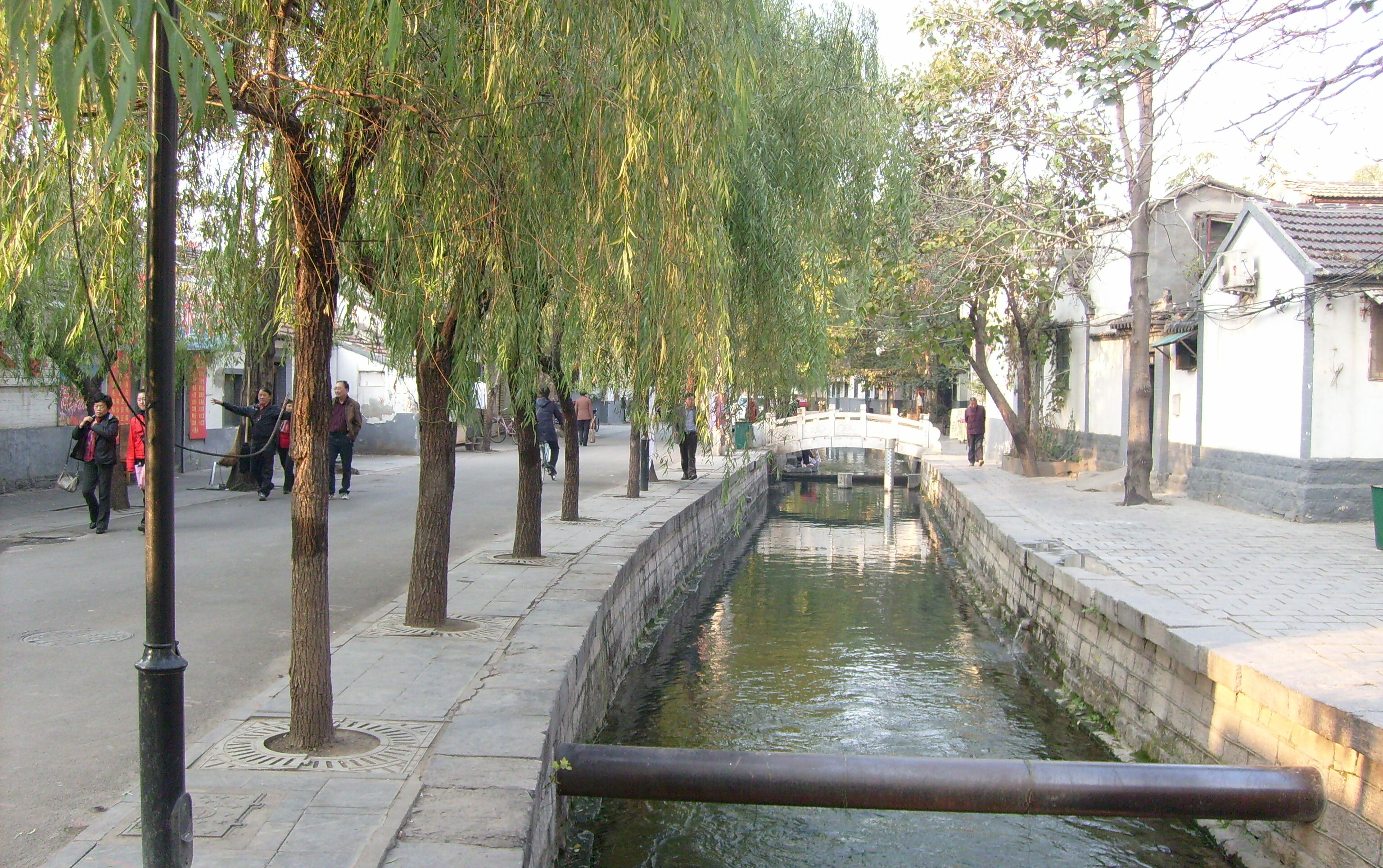 曲水亭街